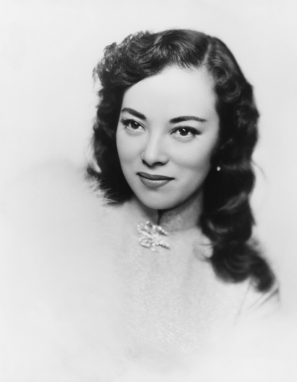 актриса и певица Ли Сянлань